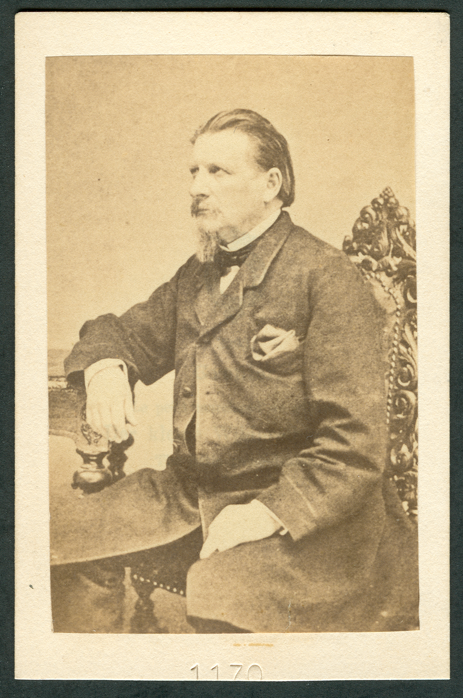 Die relative Unschärfe dieser Carte de Visite von Karl Gutzkow deutet darauf hin, daß es sich hier möglicherweise um eine Kopie von einem Fotoabzug eines anderen - ebenfalls unbekannten - Fotografen handelt. Vor der Einführung des Urheberrechtes auch für Fotografien wurde dieses Werk möglicherweise von einem anonymen Kopisten angefertigt. Der angeschnittene Blindstempel an der Unterseite läßt auf eine Seriennummer schließen und damit auf eine Mengenproduktion, nach der Art "berühmte Persönlichkeiten der (damaligen) Gegenwart". Auch der nur sehr dünne Karton ohne Werbung und ohne jegliche Verzierung (ebenso auf der Rückseite, siehe unten), zum Beispiel eine Rahmung auf der Bildseite, legt eine Datierung nahe um 1860. Eine Bildersuche über das Internet fand bisher kein gleichartiges Foto; der mögliche Kopist schien beim Verkauf "seiner" Bilder nicht besonders erfolgreich.